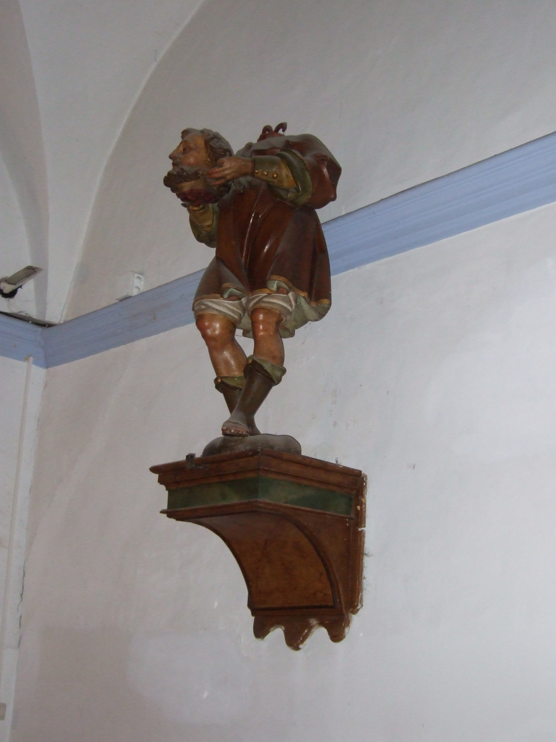 Calatayud - San Juan el Real - San Lamberto de Zaragoza.